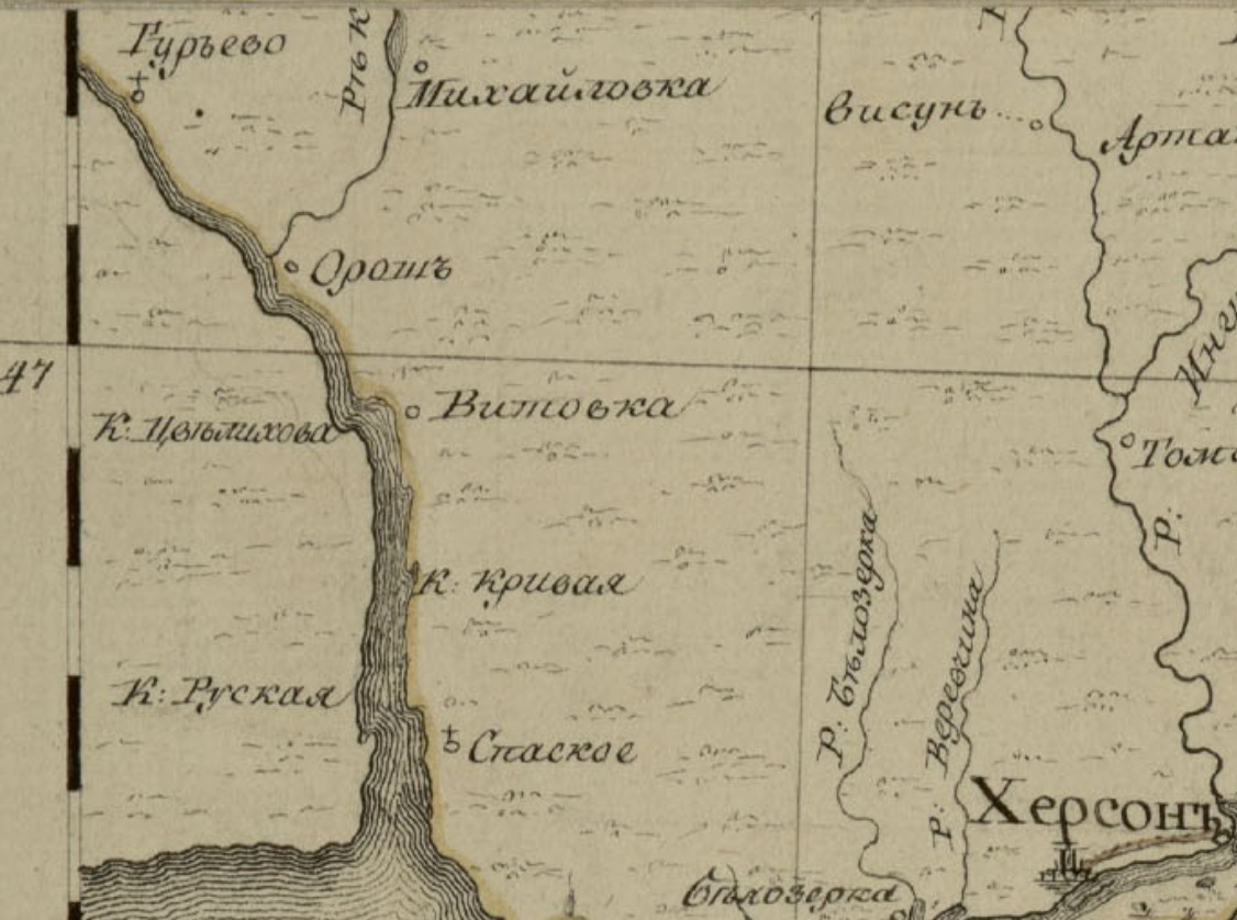 Вітовка на мапі 1787 року "Карта частей Екатеринославского наместничества и Таврической области 1787 года" зі збірки: "Вильбрехт А. Собрание карт для путешествия её императорского величества в полуденный край России в 1787 г."